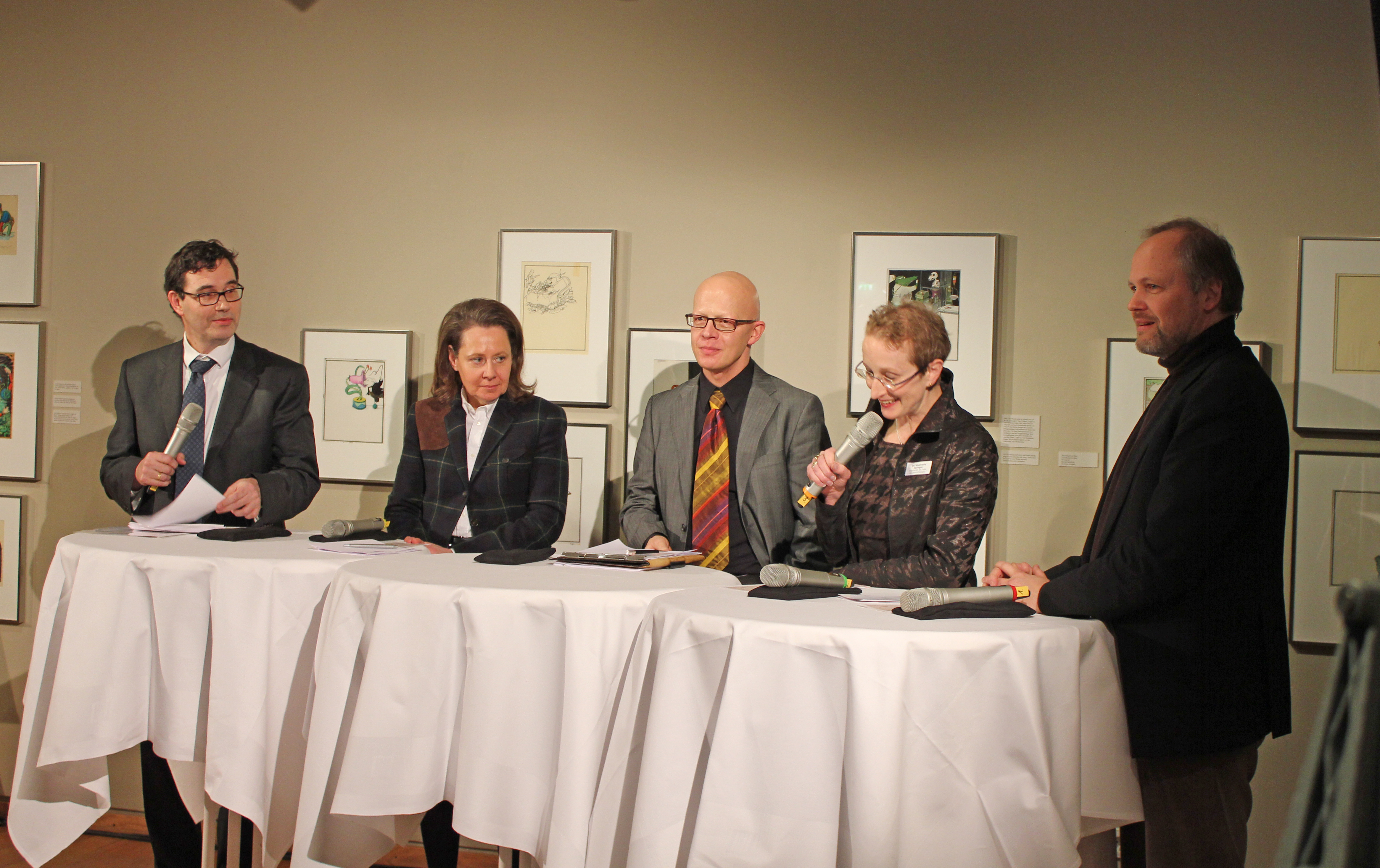 17. Empfang der Ev.-luth. Landeskirche Hannovers für Künstler und Kunstschaffende. Podiumsgespräch mit Dr. Stephan Schaede (Leiter der Ev. Akademie Loccum), Dr. Gisela Vetter-Liebenow (Direktorin des Wilh.- Busch-Museums), Dr. Philipp Stoellger (Prof. für systematische Theologie) Rostock, Dr. Stephanie Springer (Präsidentin des Landeskirchenamtes Hannover), Dr. Wolfgang Ullrich (Prof. für Kunstwissenschaft), Karlsruhe. (von links)